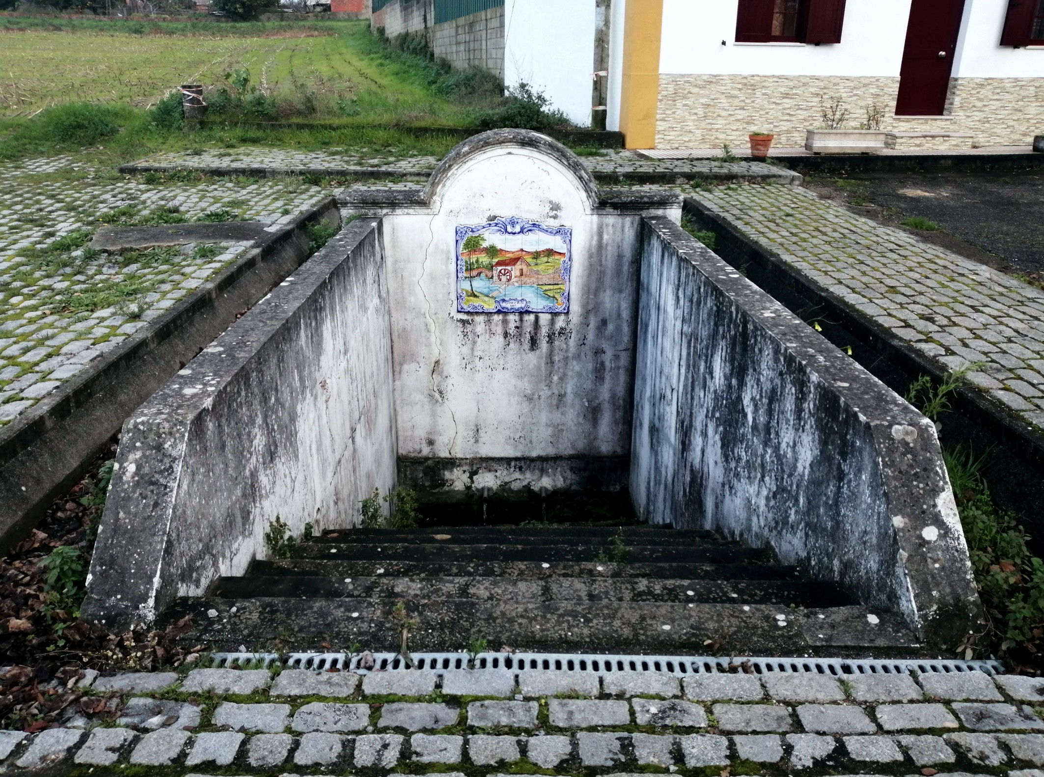 Imagem da Fonte de Ouca, na qual é visível o painel de azulejo, datado de 2007.